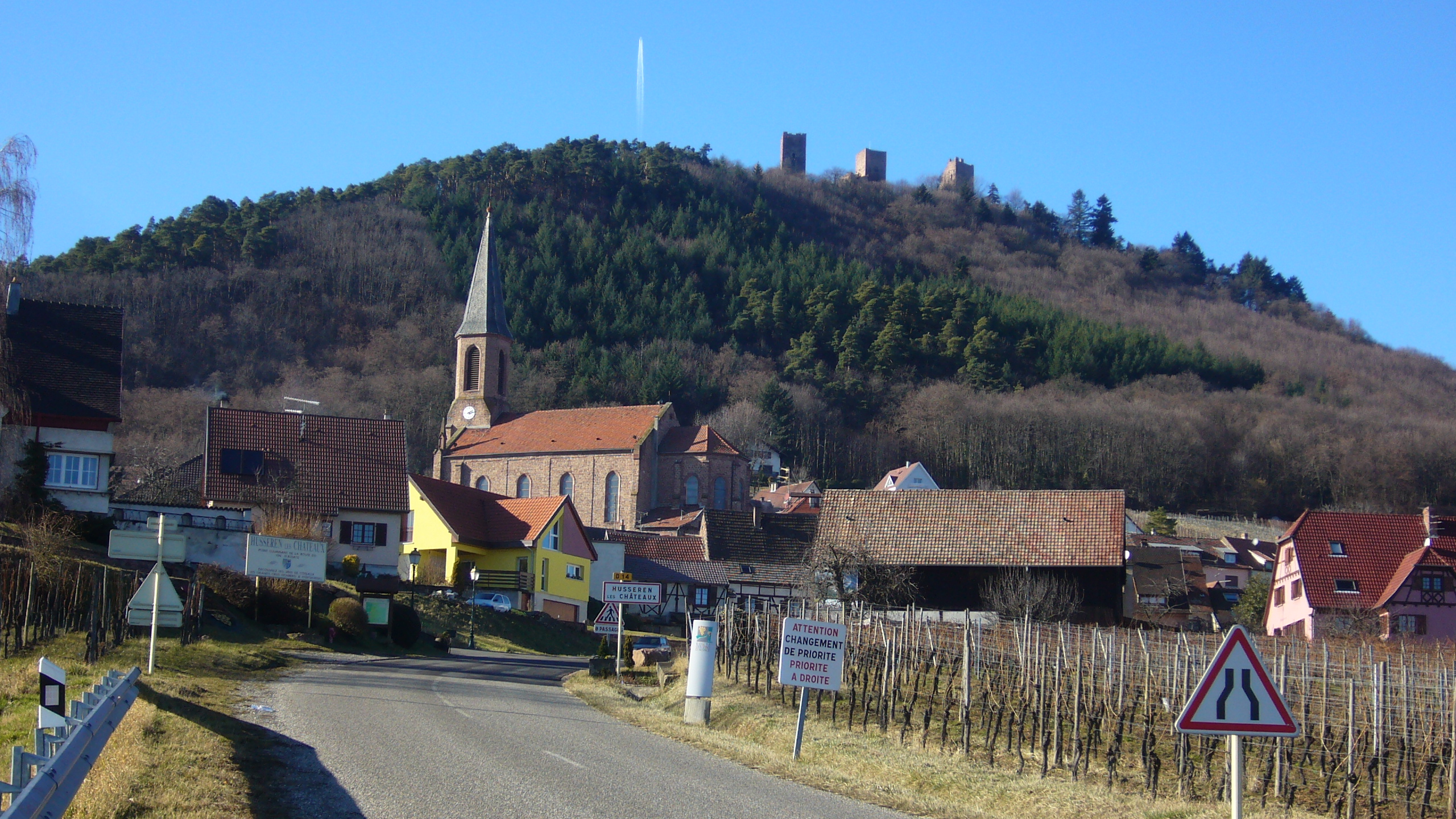 L'entrée du village de Husseren-Les-Châteaux (Haut-Rhin)